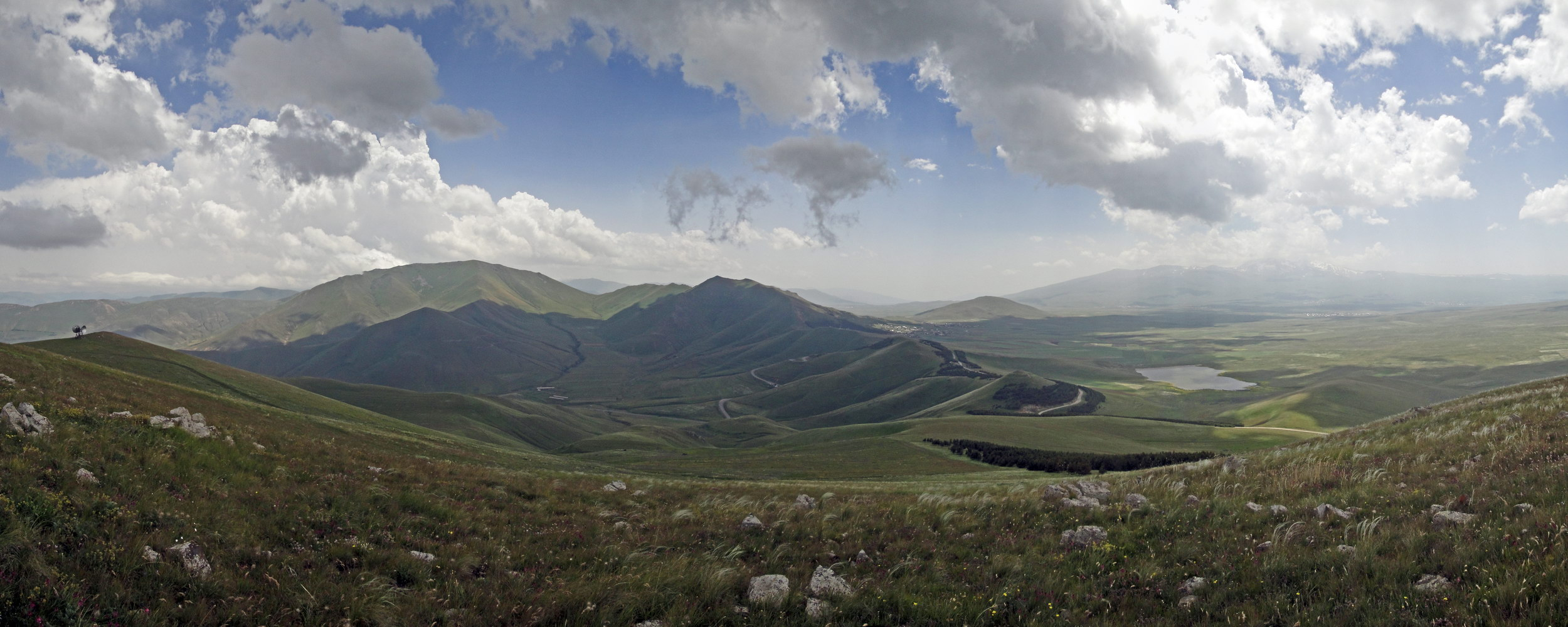 Вид на Памбский перевал с вершины горы Менаксар